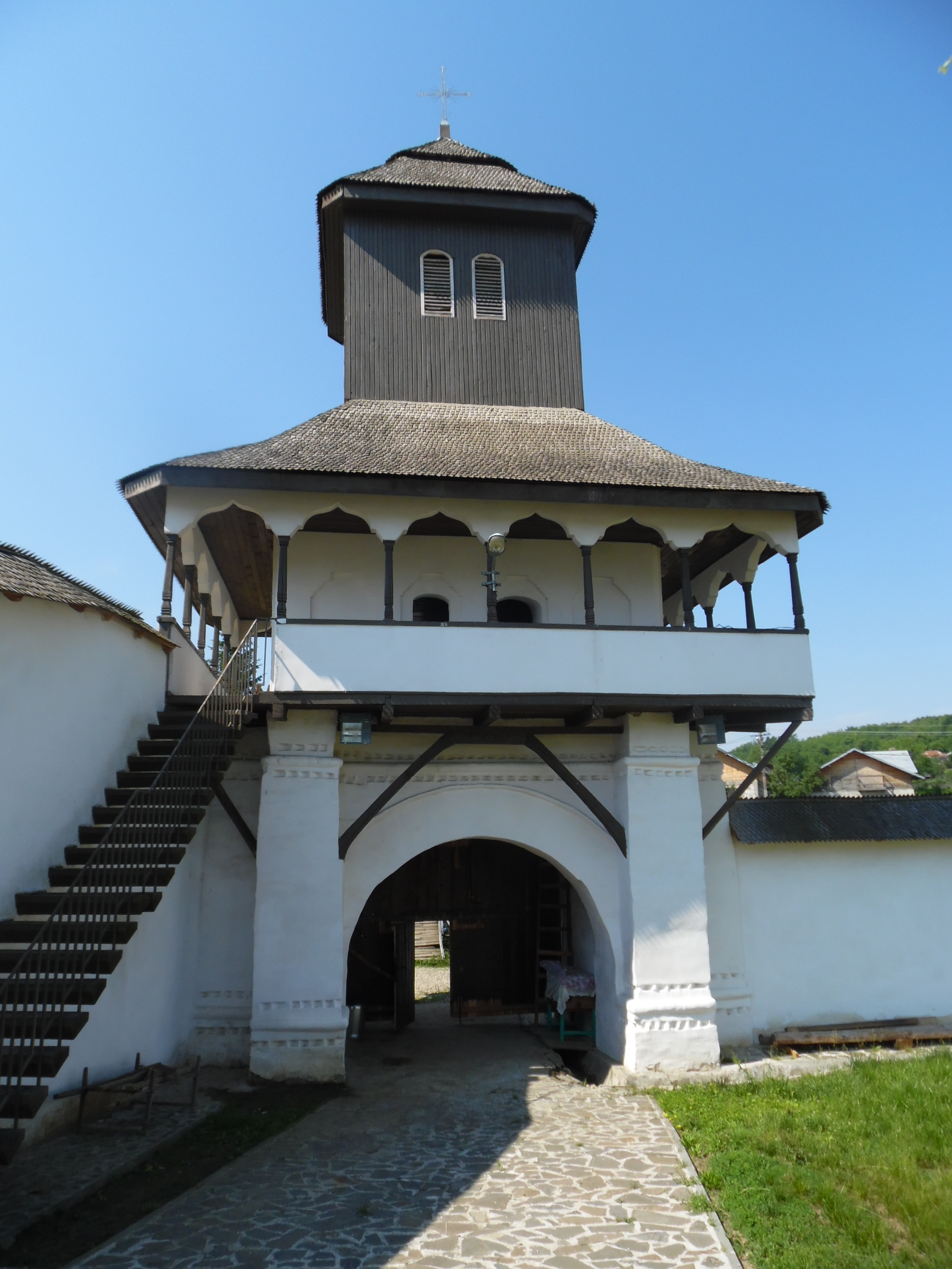 Manastirea Varbila